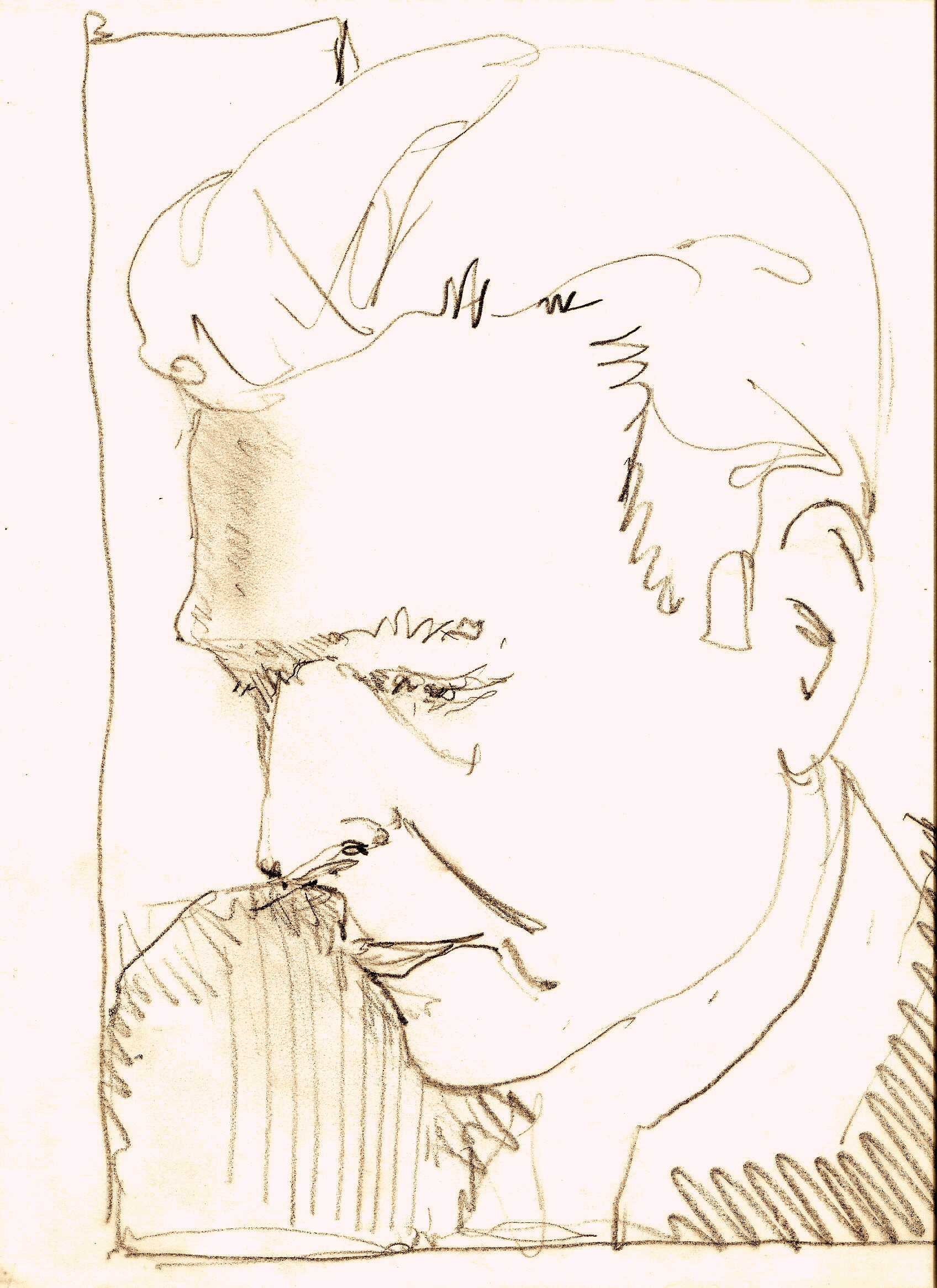 Porträtskizze